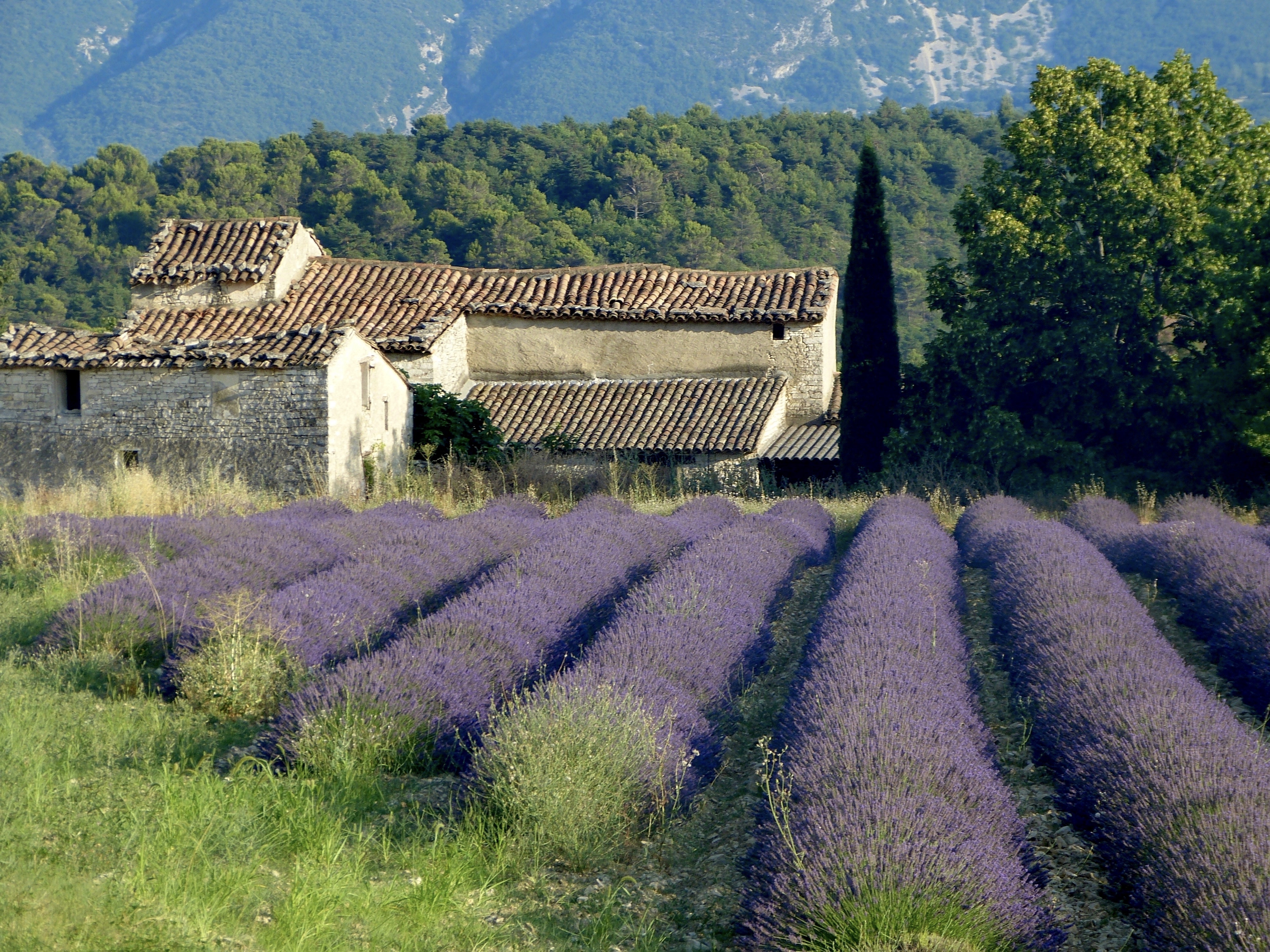 Champs de lavande près de Apt